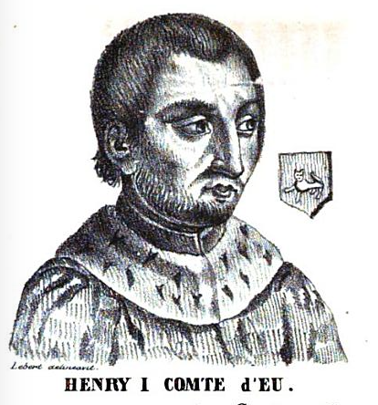 Jindřich I. z Eu